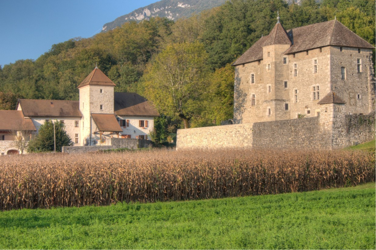 Château de Mecorat